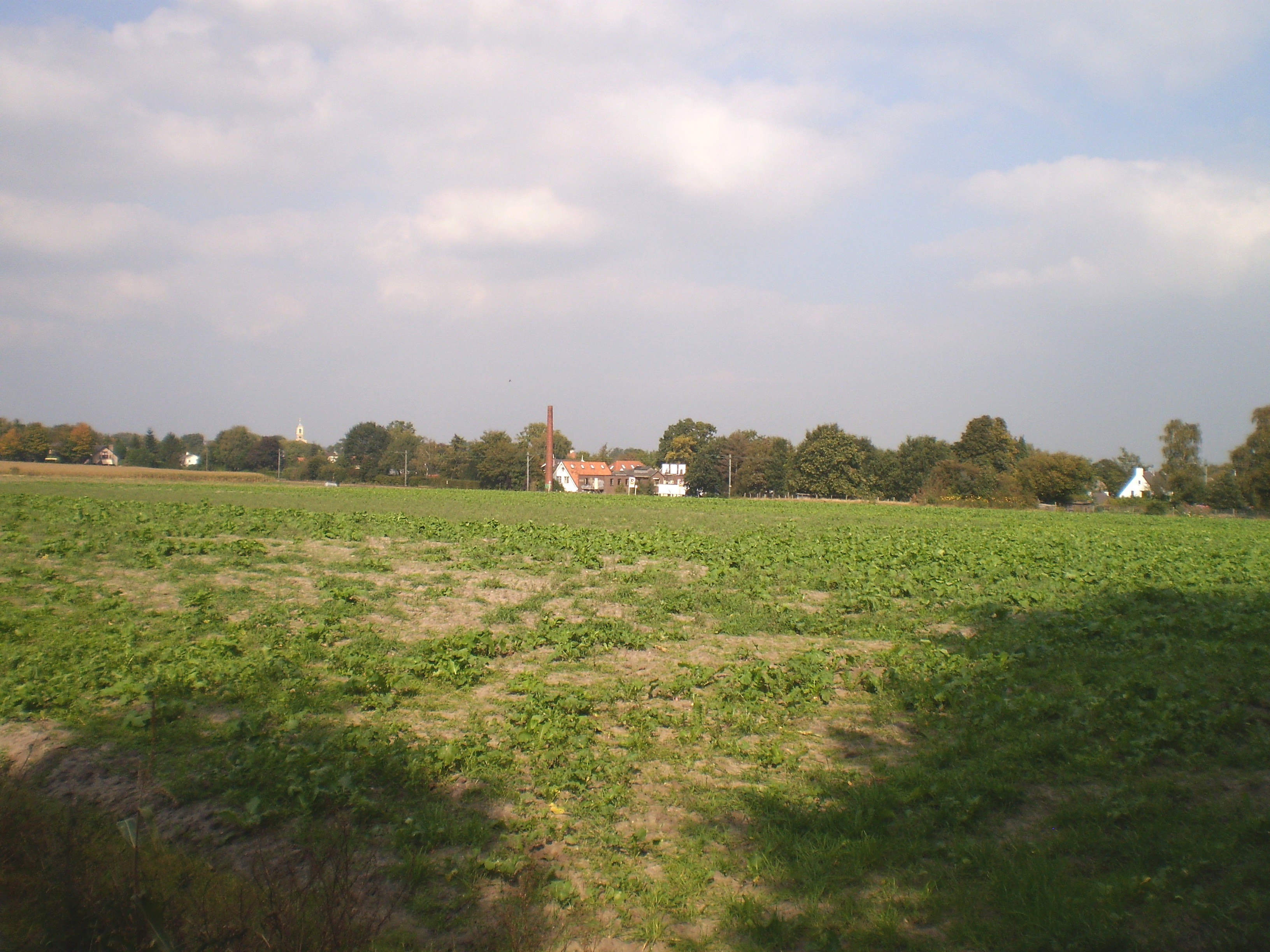 Soester Eng